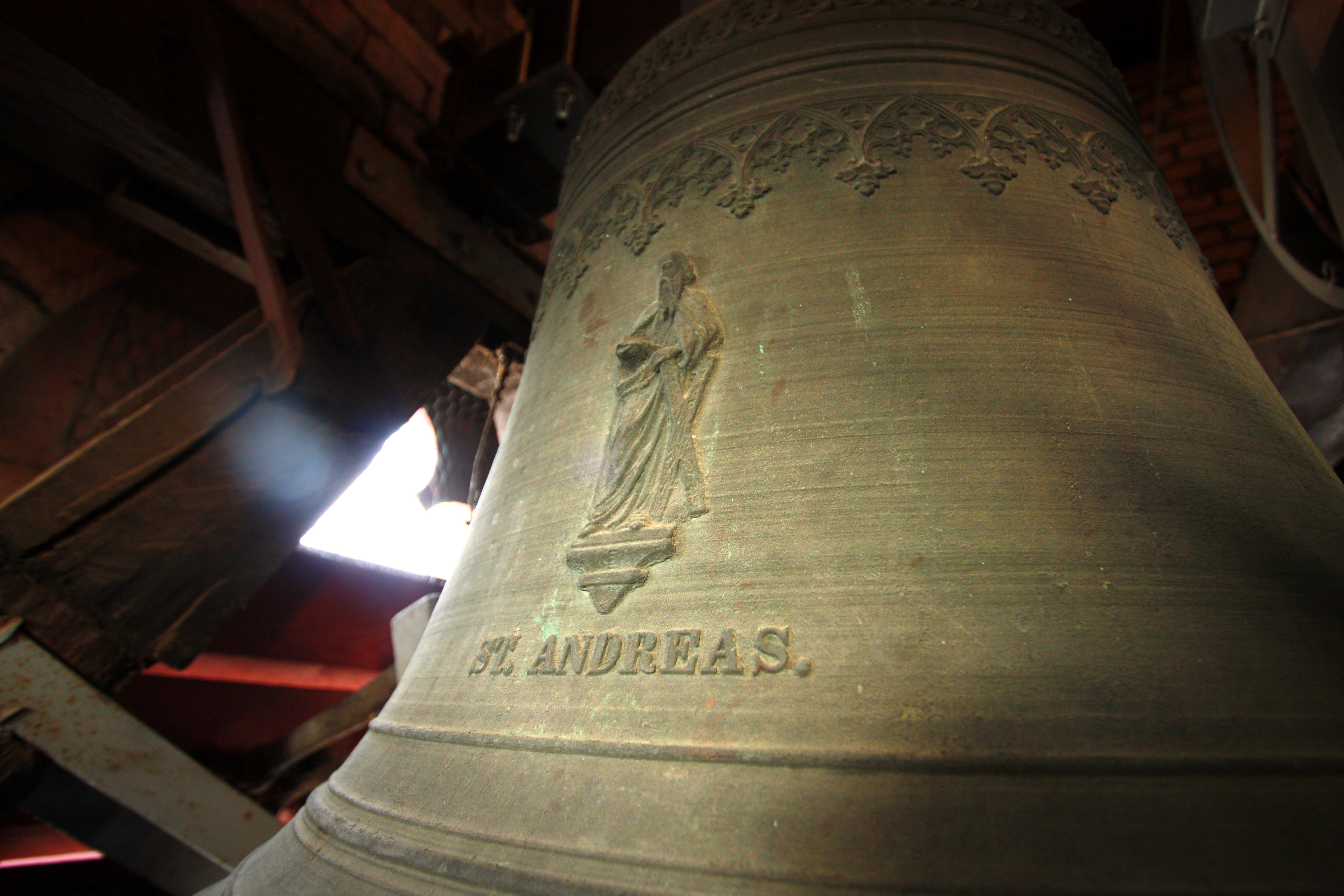 Andreas-Glocke im Dachstuhl von St Andreas aus Klein-Winternheim 2009